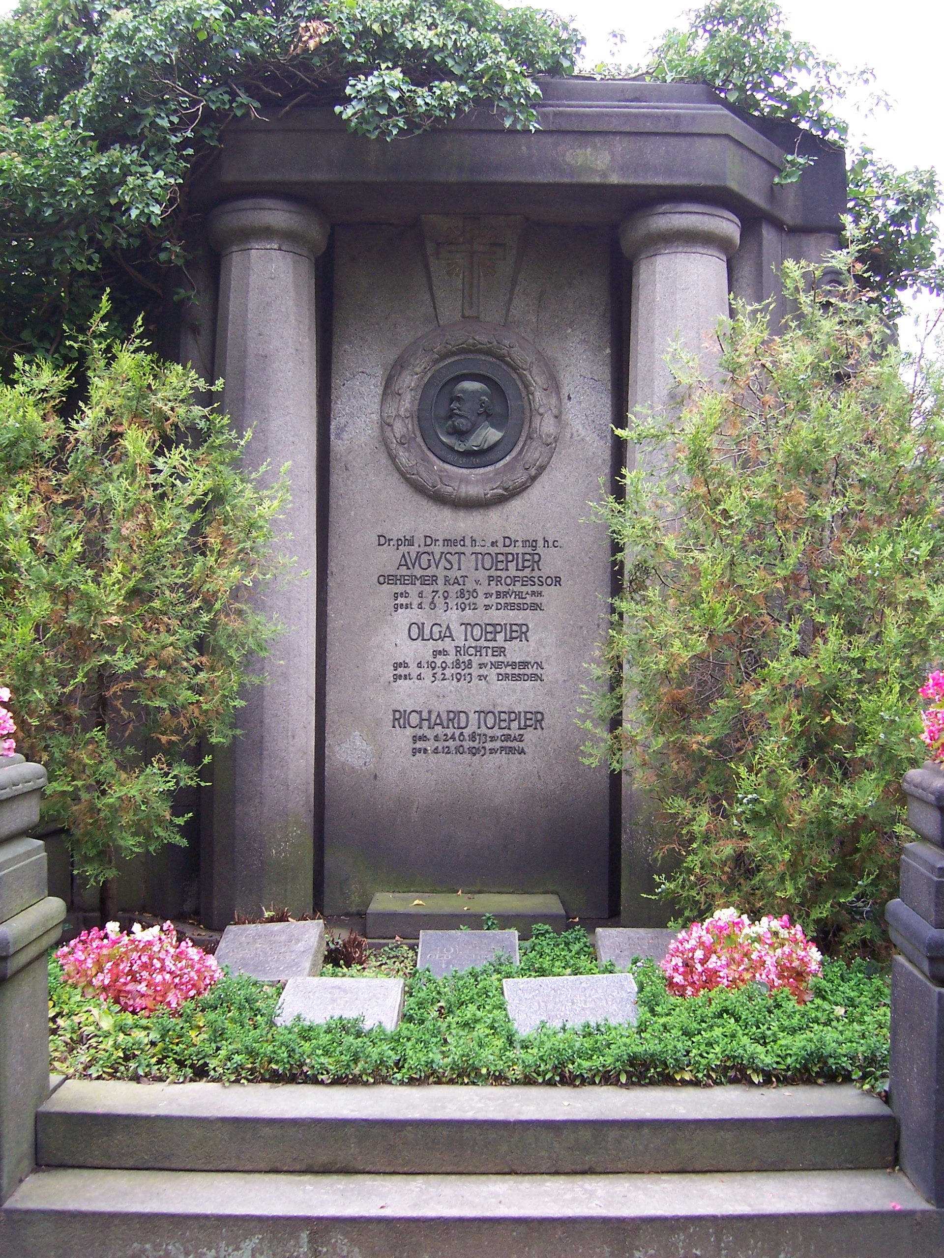 Familiengrab u.a. der Physiker August und Maximilian August Toepler auf dem Johannisfriedhof in Dresden.